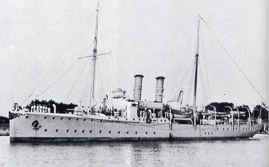 Das Kanonenboot SMS PANTHER